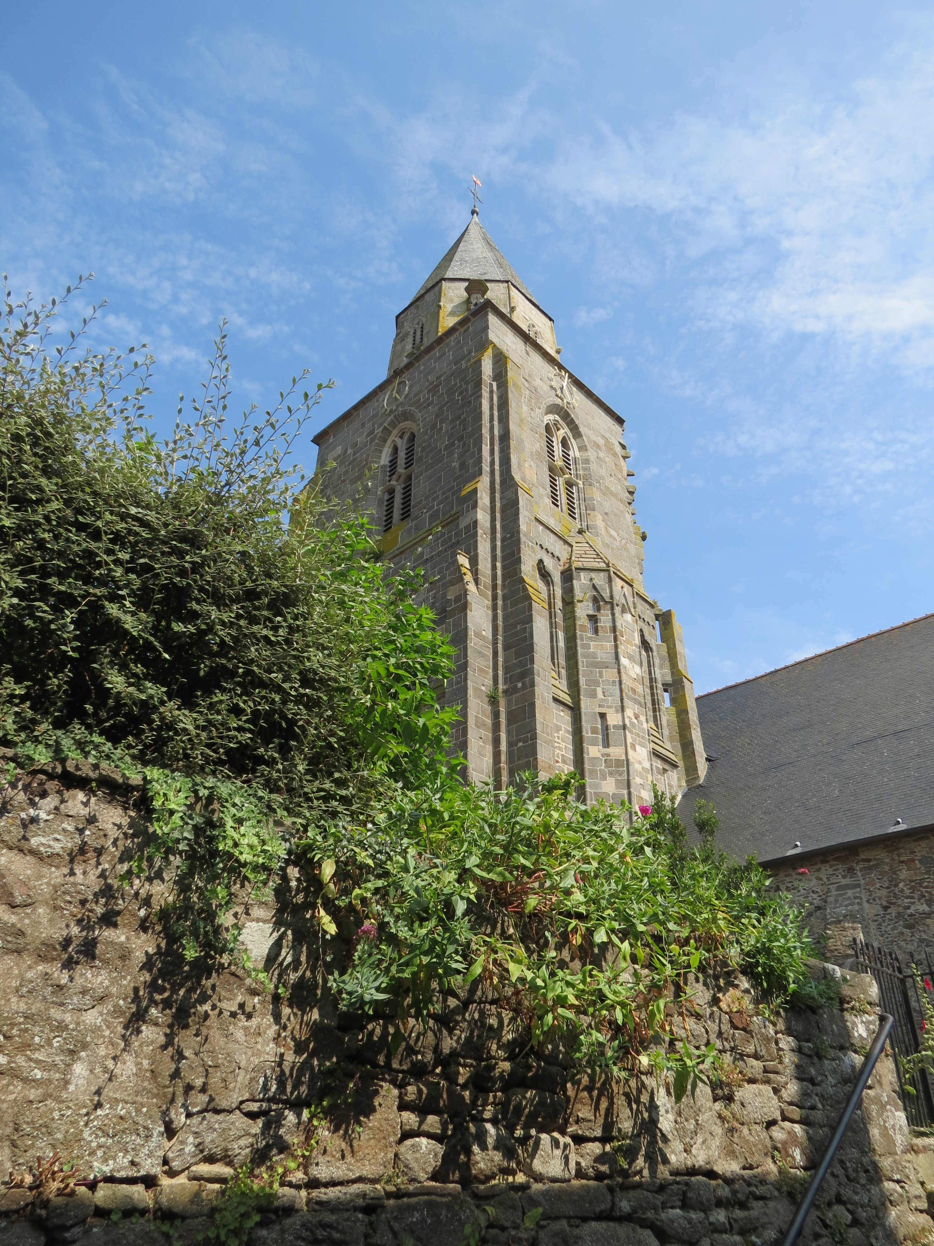 Église de Saint-Suliac (Bretagne, France)